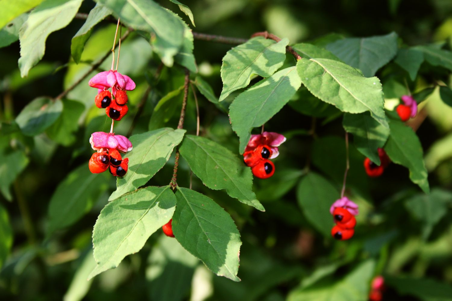 Warzen-Spindelstrauch (Euonymus verrucosus), Baumwürgergewächse (Celastraceae) - Österreich/Austria/Autriche: Niederösterreich, Weinviertel, Leiser Berge, Südfuß des Zahlbergs NNW Niederleis